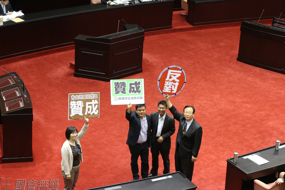 中文（台灣）: 台聯立委周倪安（左）、民進黨立委莊瑞雄（中）、國民黨立委林德福（右）分別舉牌表達黨團表決立場。